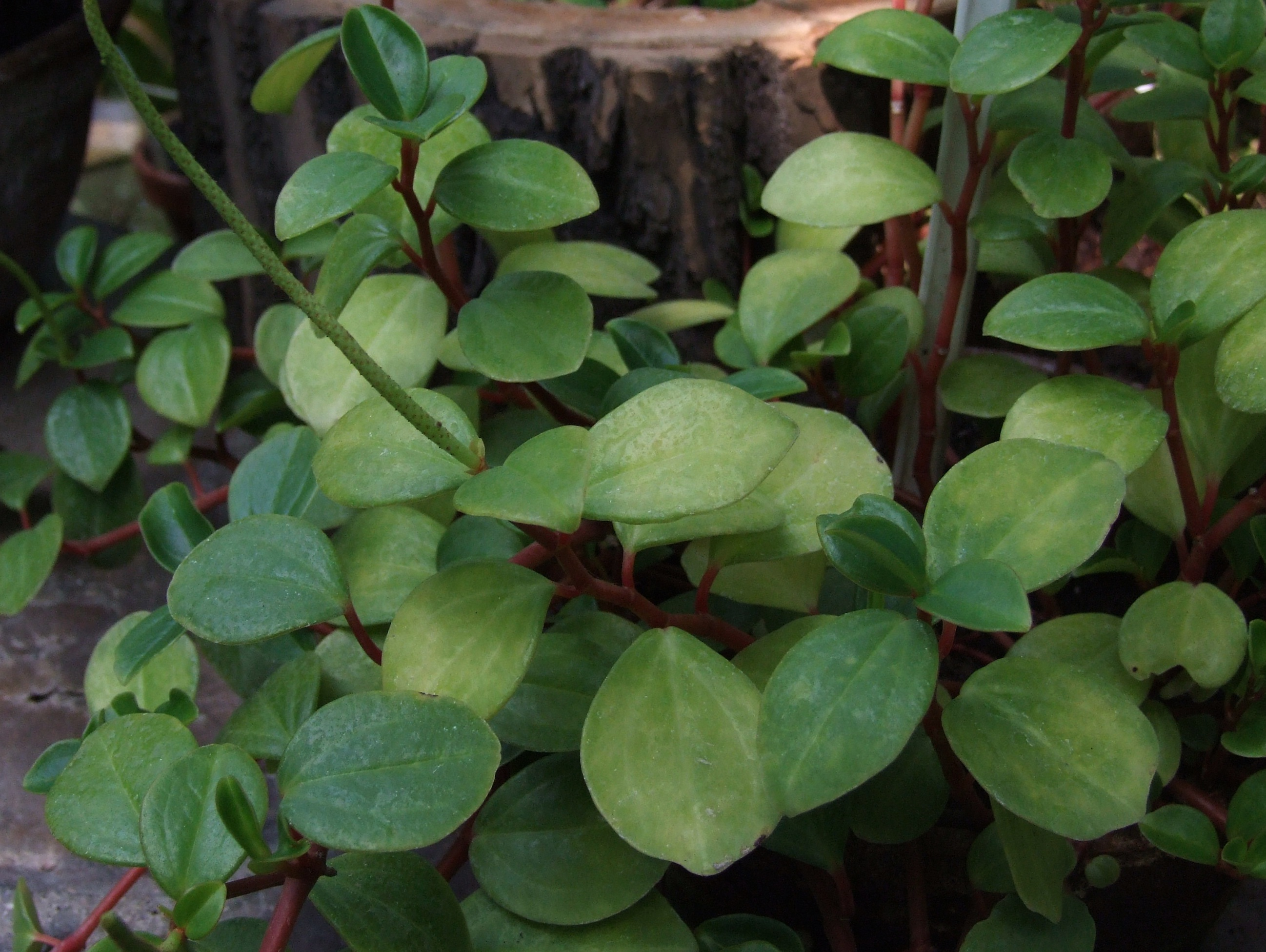 Peperomia glabella